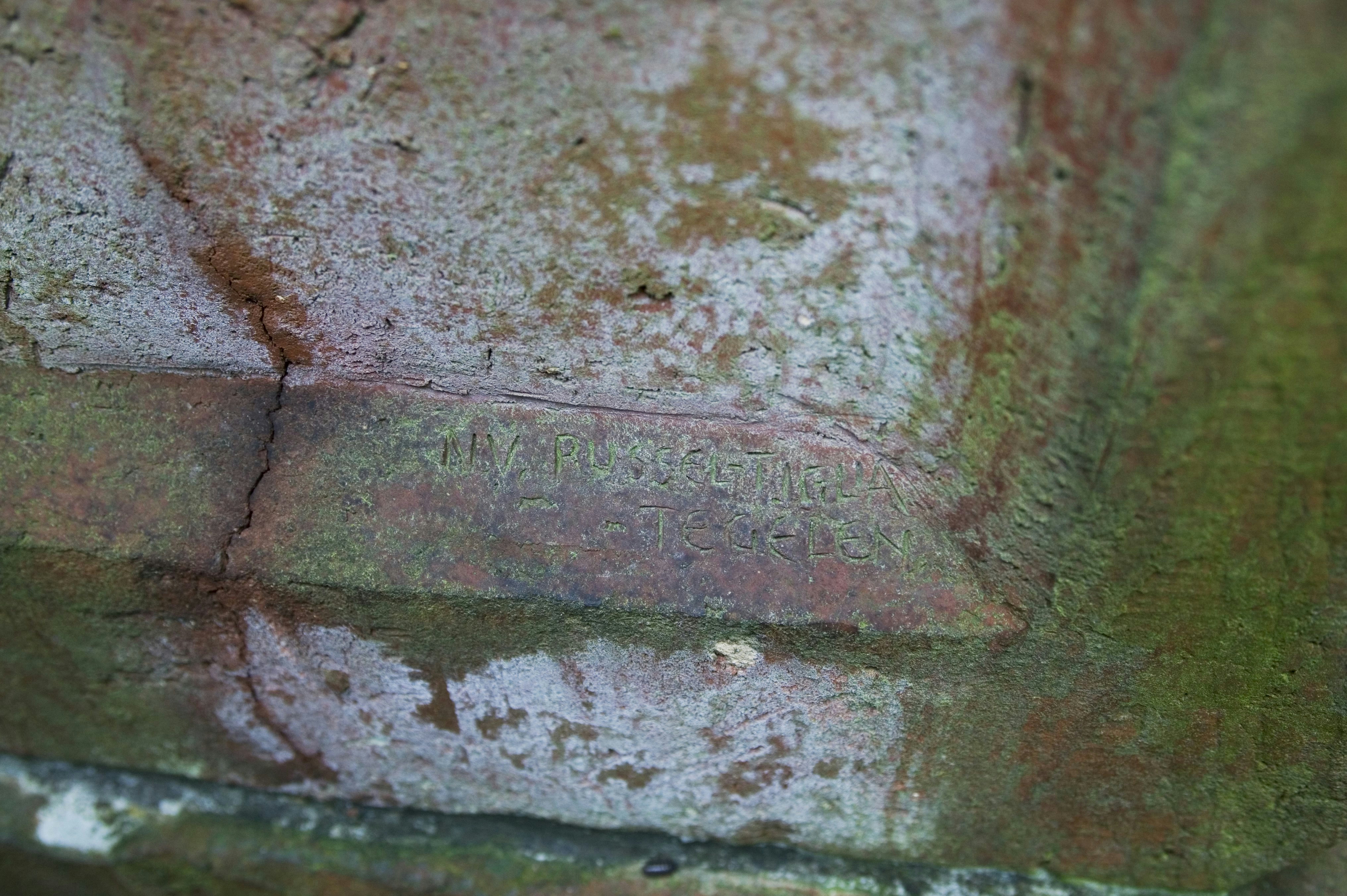 Van Rosendael: Detail van een keramisch grafmonument: signering door de fabrikant. Kleigroeve Russel-Tiglia, Tegelen (opmerking: Deze foto is een onderdeel van fotoreportage over begraafplaatsen waarbij symboliek, gebruiken en verschillende onderdelen werden vastgelegd. Opnamen zijn gemaakt op diverse begraafplaatsen.)